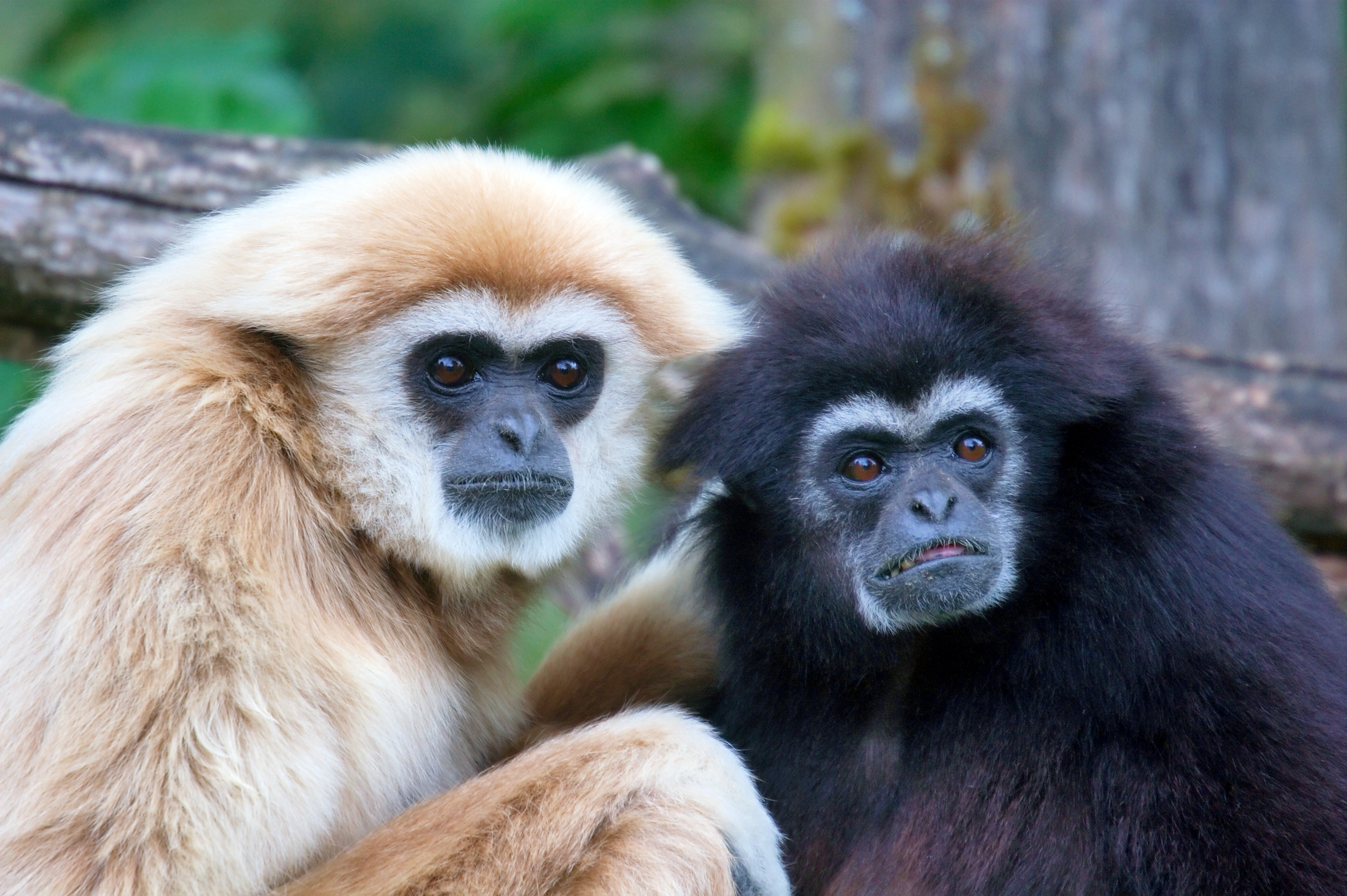 Hylobates lar